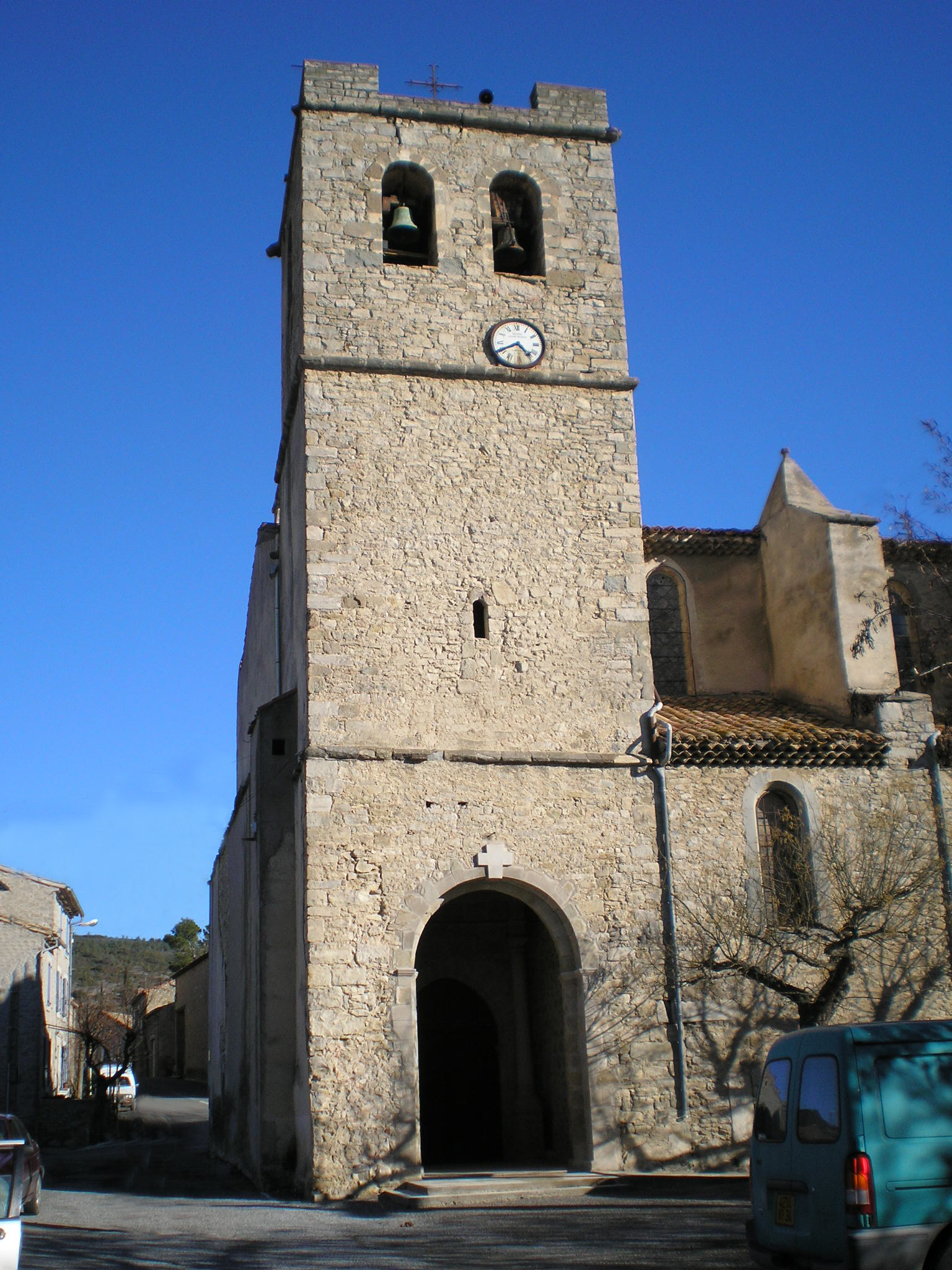 Azillanet (Hérault) - église Saint-Laurent (XVIIe siècle).